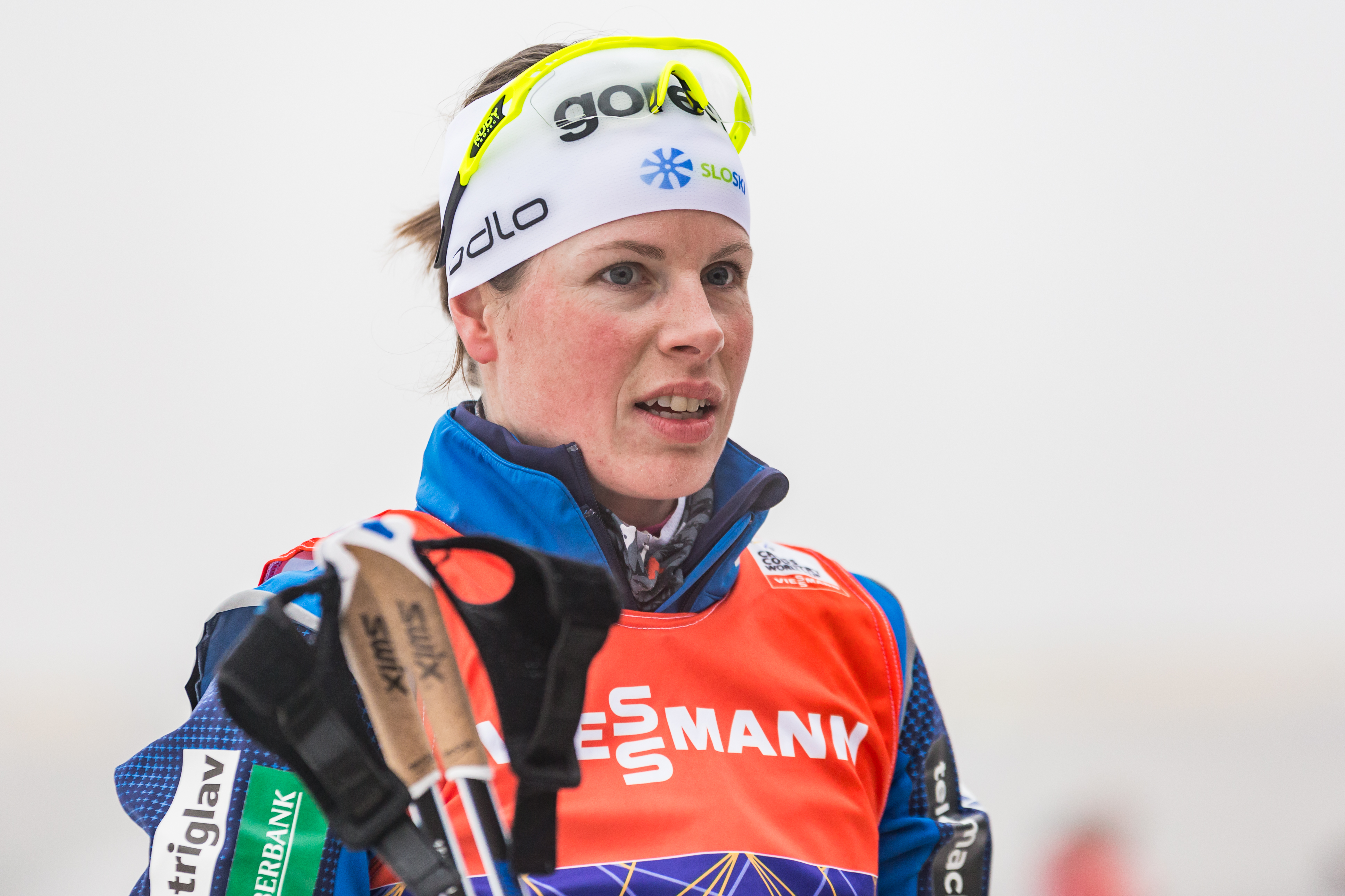 Vesna Fabjan (SLO, Slowenien)